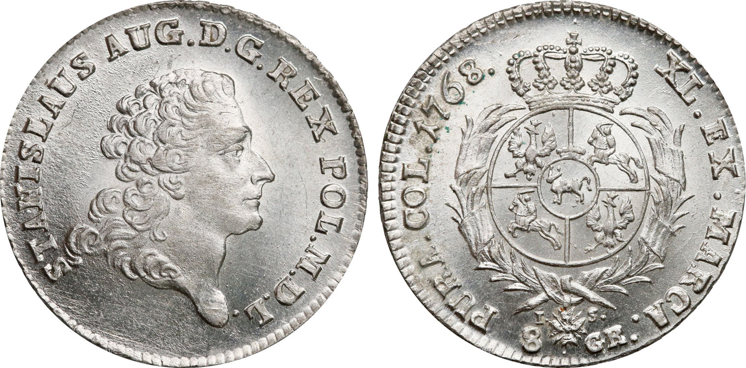 2 złote koronne 1768